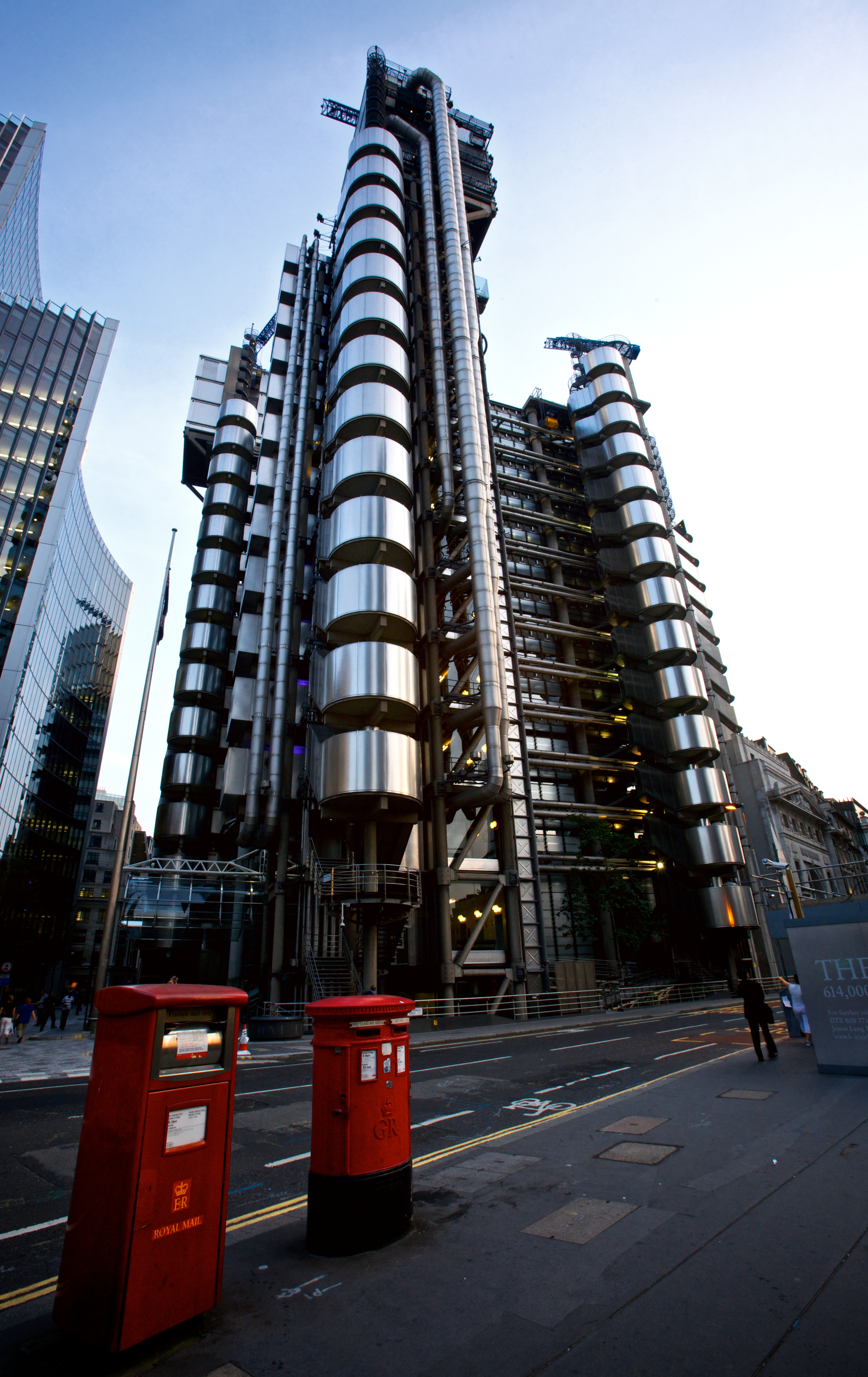 Lloyds